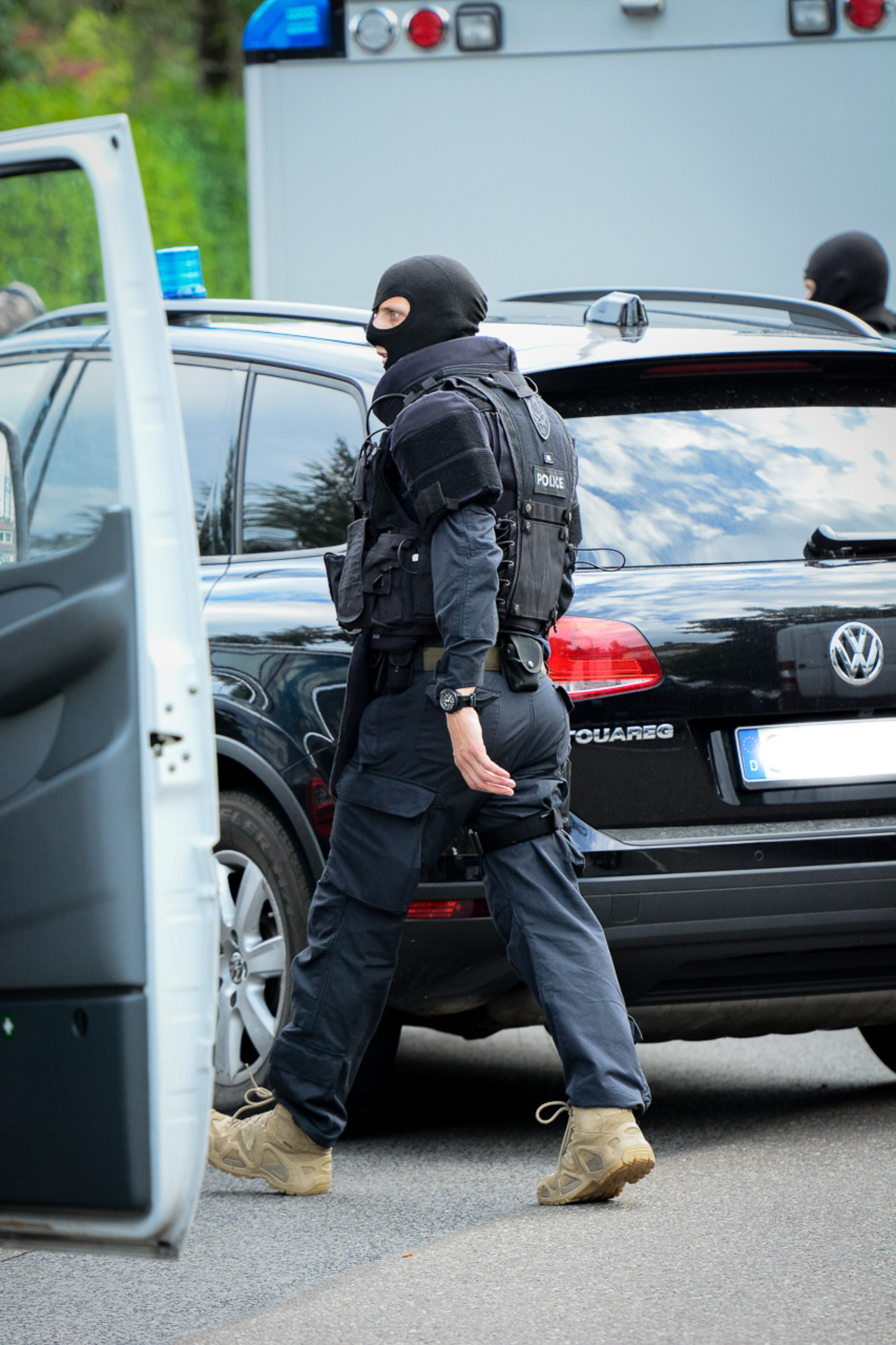 Ein Angehöriger der Spezialeinheit Enzian bei einem Einsatz